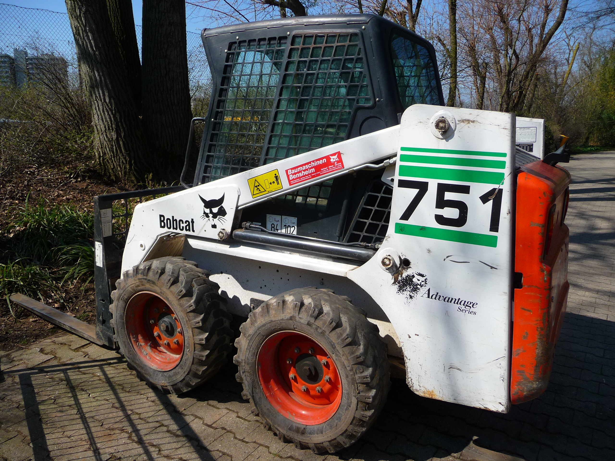 Bobcat 751 Advantage Series (Kompaktlader)